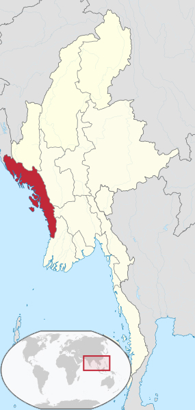 جانمایی ایالت راخین در میانمار